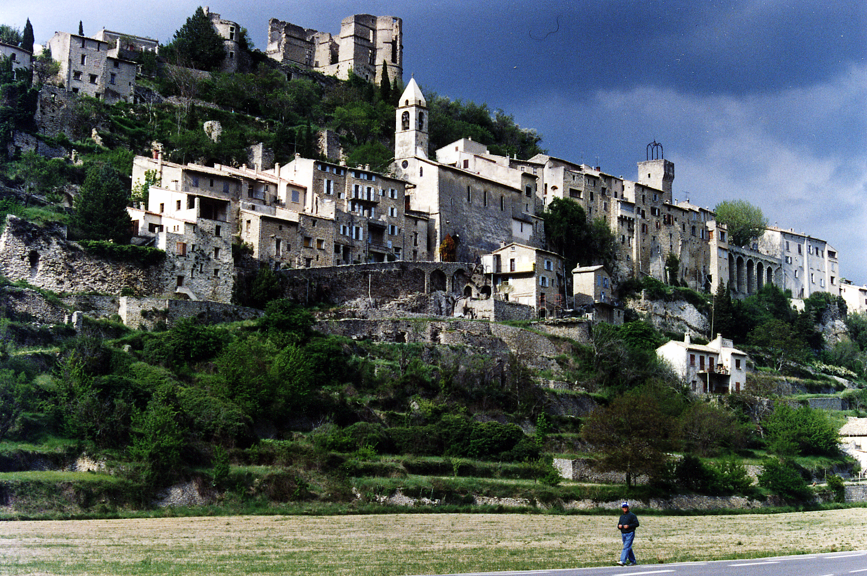 Montbrun-les-Bains, village perché